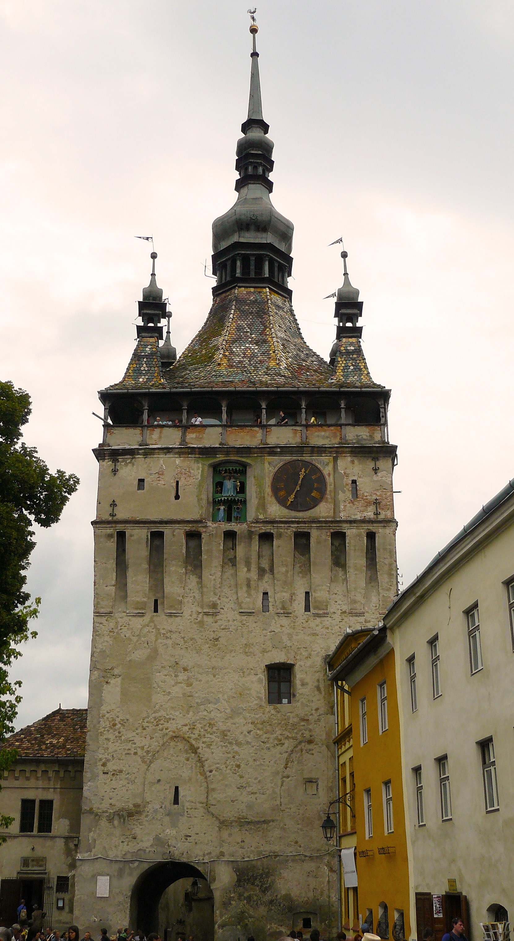 Tour horloge à Sighisoara, Roumanie